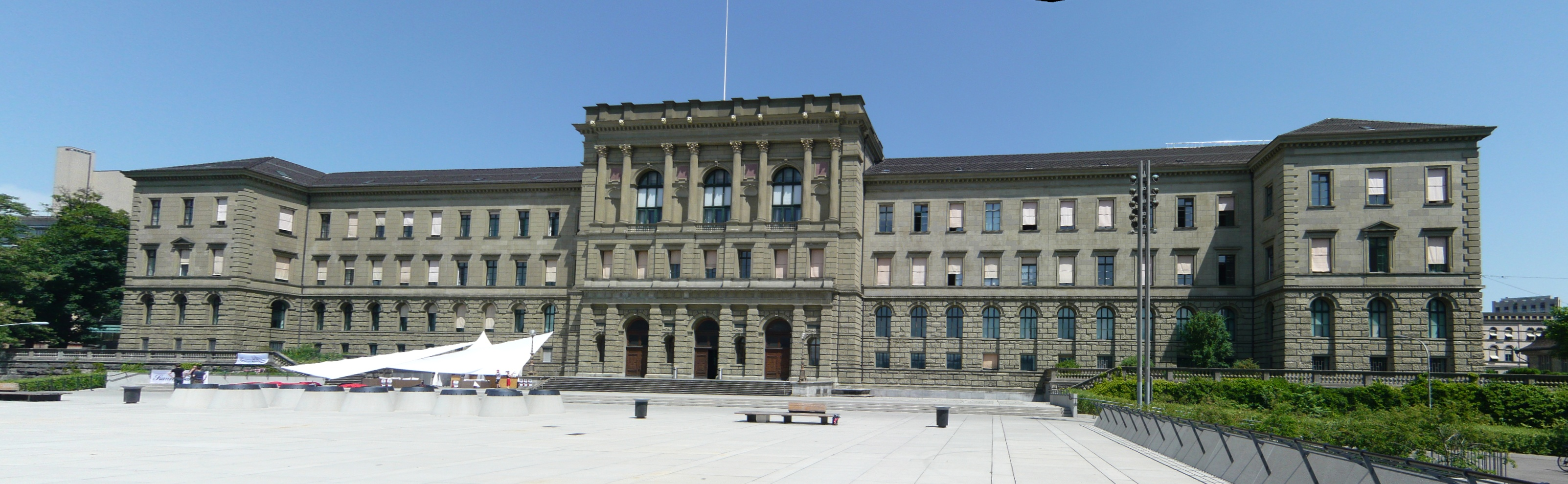 Panoramaaufnahme der ETH-Zürich.